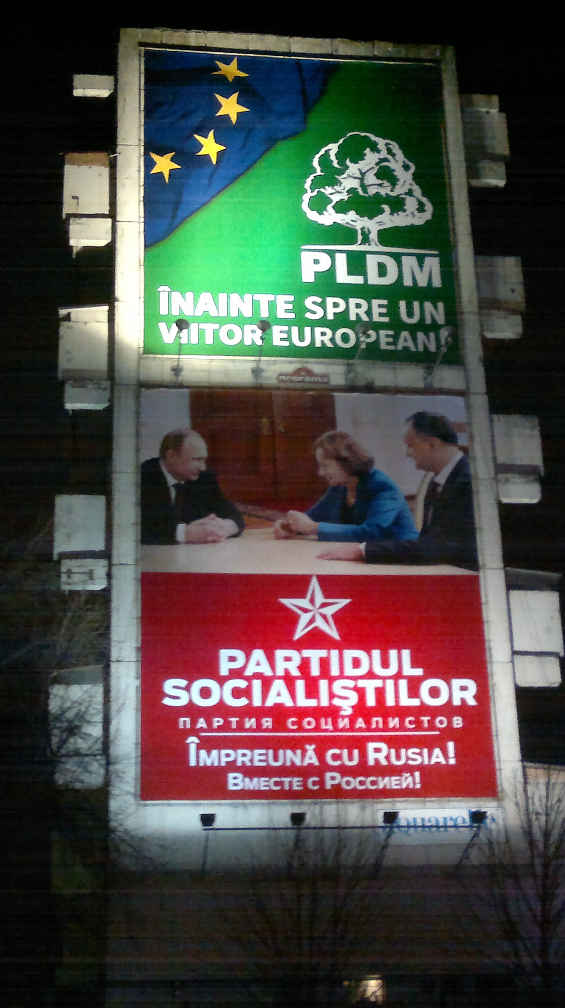 Placate electorale în timpul campaniei pentru Alegerile parlamentare din 2014 în Republica Moldova